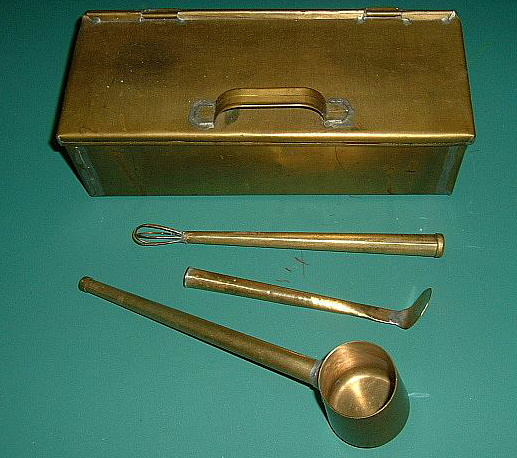 selbst fotografiert am 22.10.04, PD und GNUFDL, --Peng 12:57, 14 June 2006 (UTC) Bild